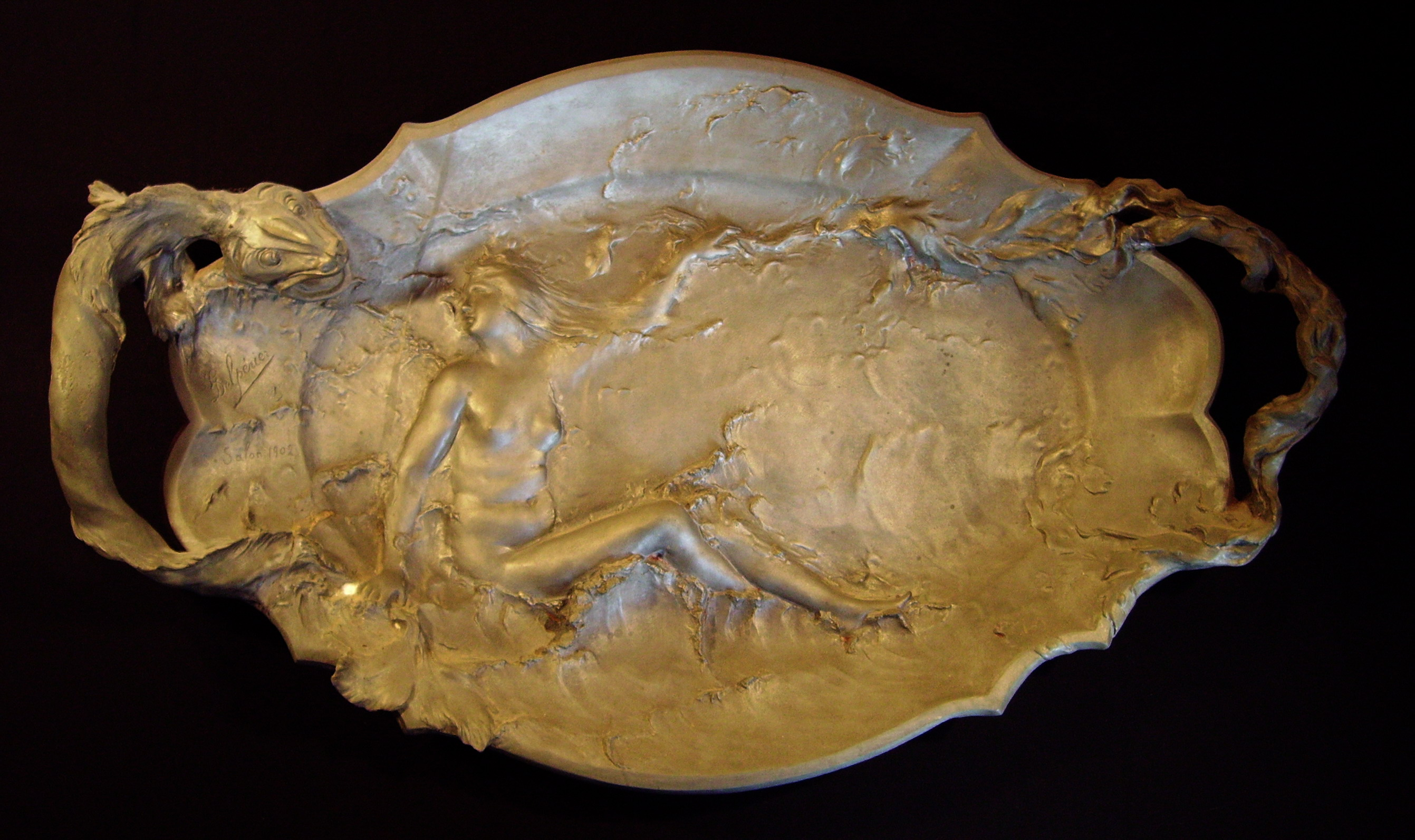 Salon 1902 Georges Delpérier